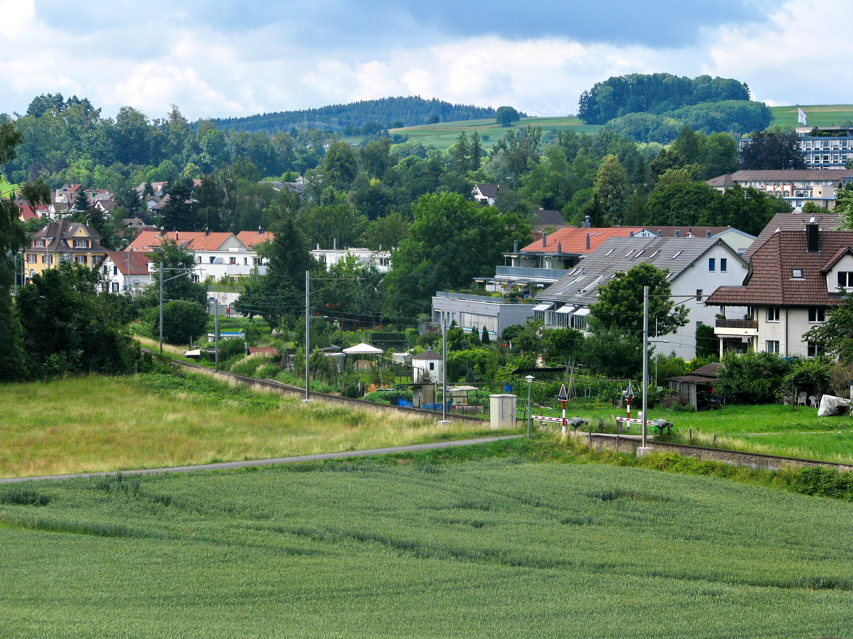 Irgenhausen (Pfäffikon), Ansicht vom römischen Kastell, Blickrichtung Pfäffikon / Russikon.